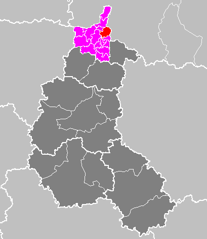 Maps of arrondissements and cantons of France: Arrondissement de Charleville-Mézières - Canton de Monthermé.PNG